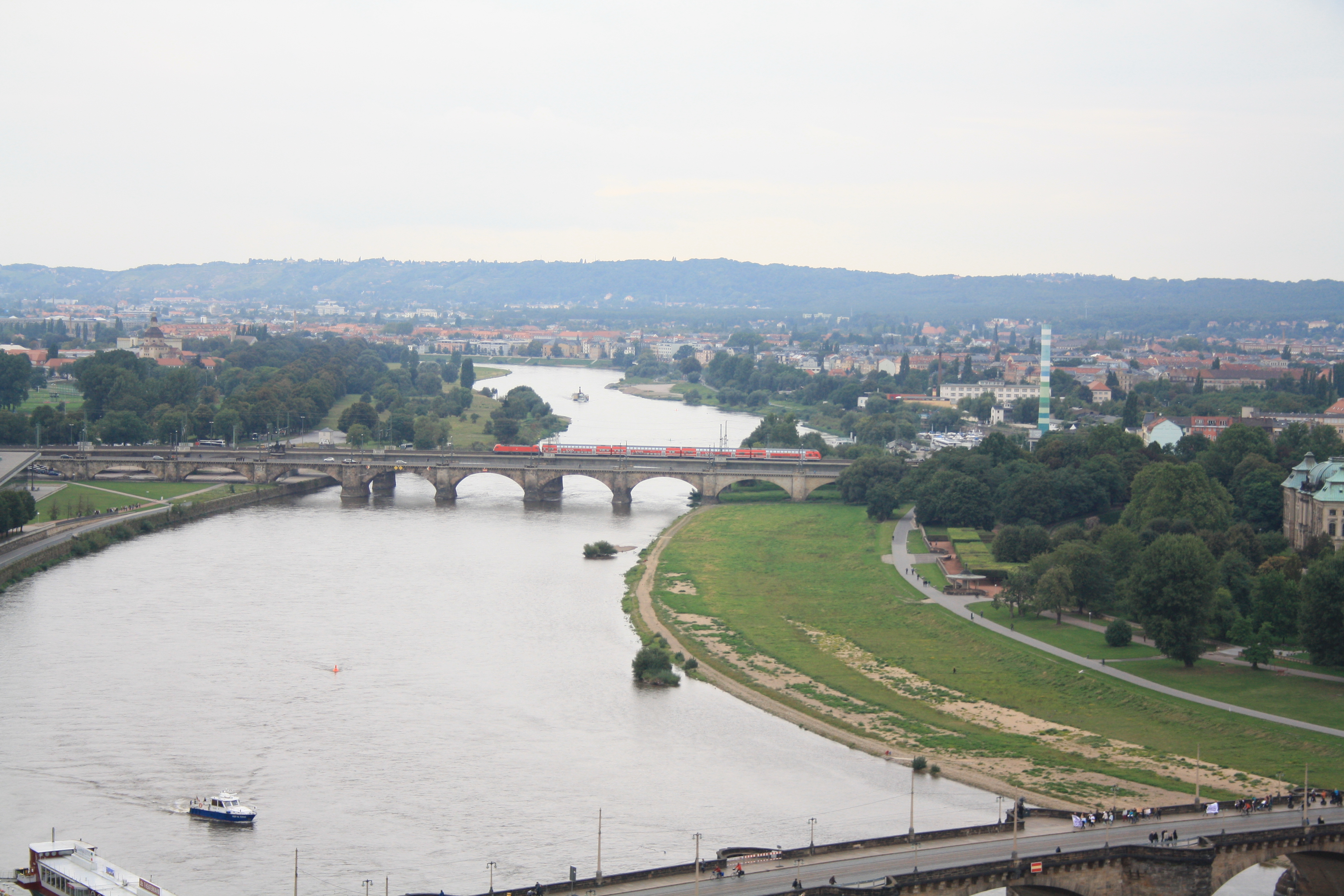 Die rund 470 Meter lange Marienbrücke (Dresden) in Dresden über die Elbe von der Frauenkirche aus gesehen. Vorne die vierspurige Straßenbrücke der Bundesstraße 6, direkt dahinter die fünfgleisige Eisenbahnbrücke der Bahnstrecke Děčín–Dresden-Neustadt, die u.a. von der S-Bahn Dresden genutzt wird.